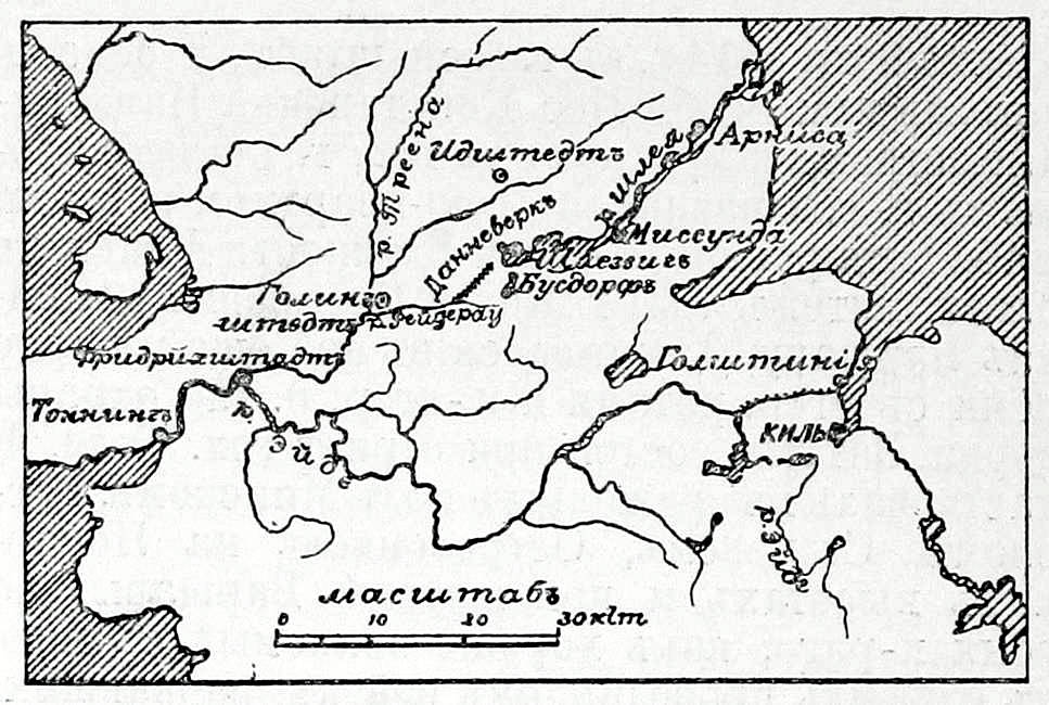 Это изо было использовано в статье «Данневерк» опубликованной в восьмом томе «Военной энциклопедии», который был издан книгоиздательским товариществом И. Д. Сытина в 1912 году в столице Российской империи городе Санкт-Петербурге.